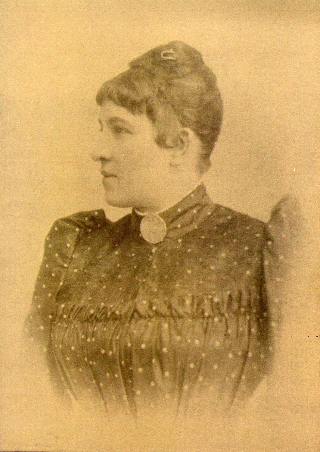 Svatová Tereza roz.Albertová